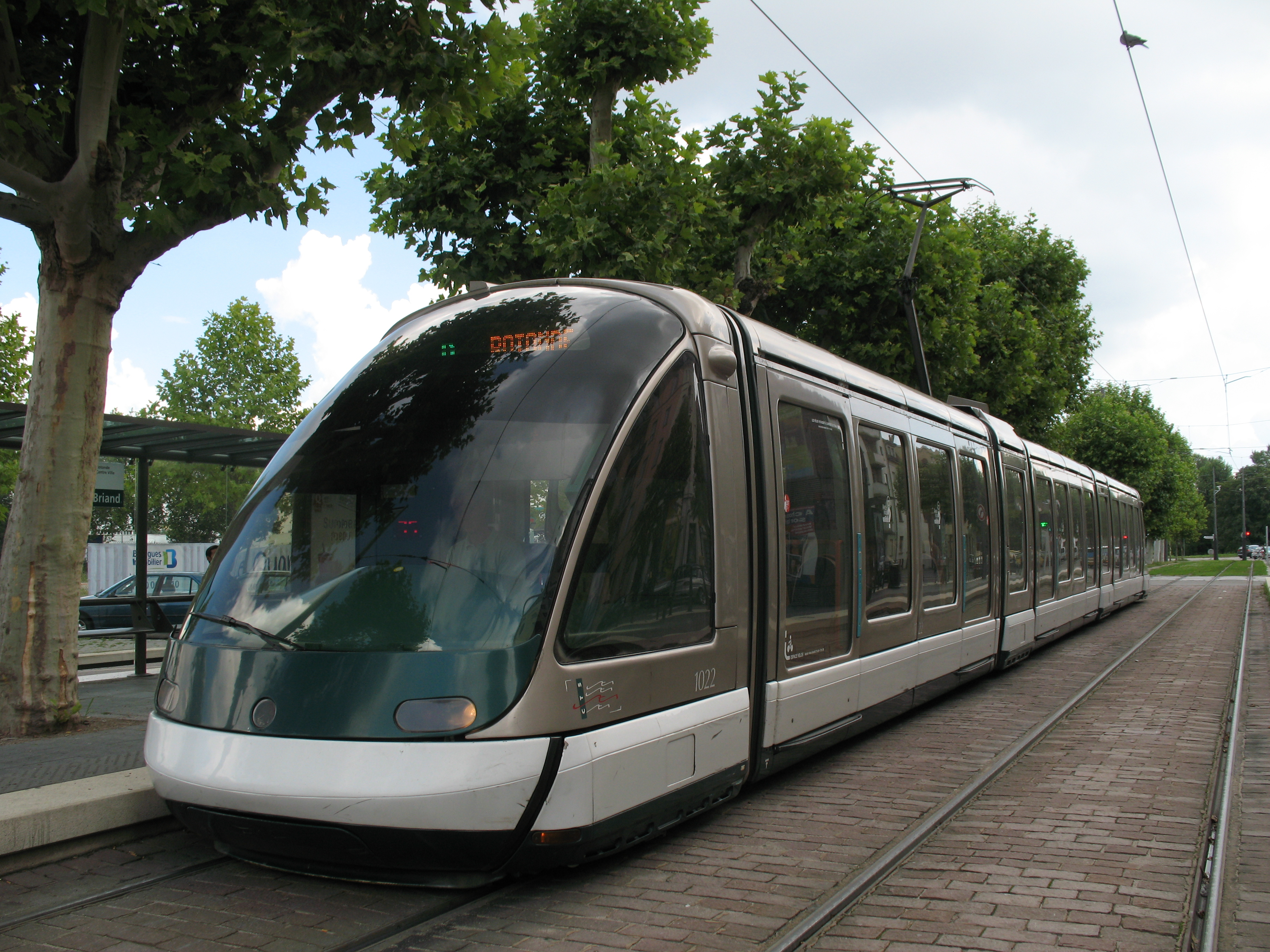 Tramway Bombardier Flexity Outlook sur la ligne D du tramway de Strasbourg à la station Aristide Briand.